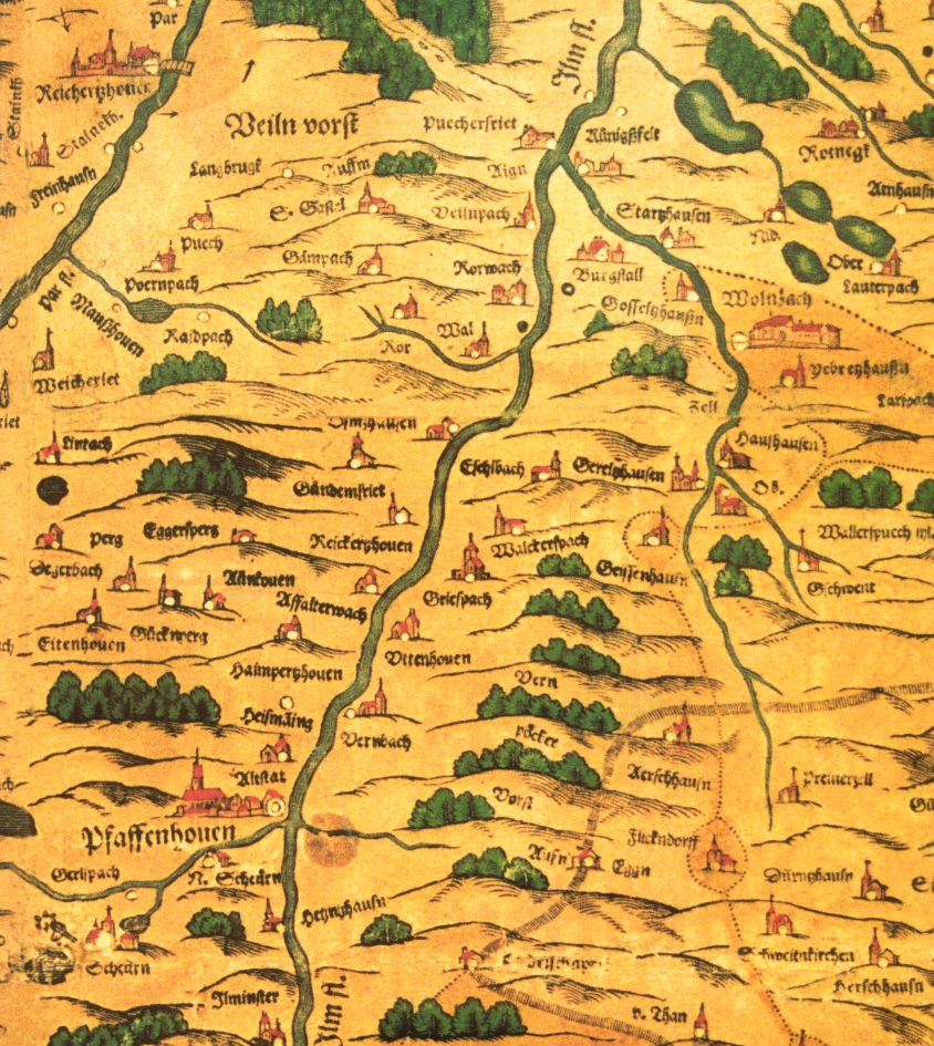 Bairische Landtafeln von Philipp Apian / Ausschnitt aus der Landkarte von 1568